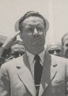 Víctor Paz Estensoro, en su llegada a Bolivia en la primera visita oficial de un Presidente chileno a Bolivia.